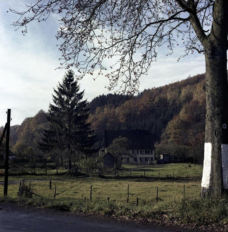 Herbst im Bergischen Land